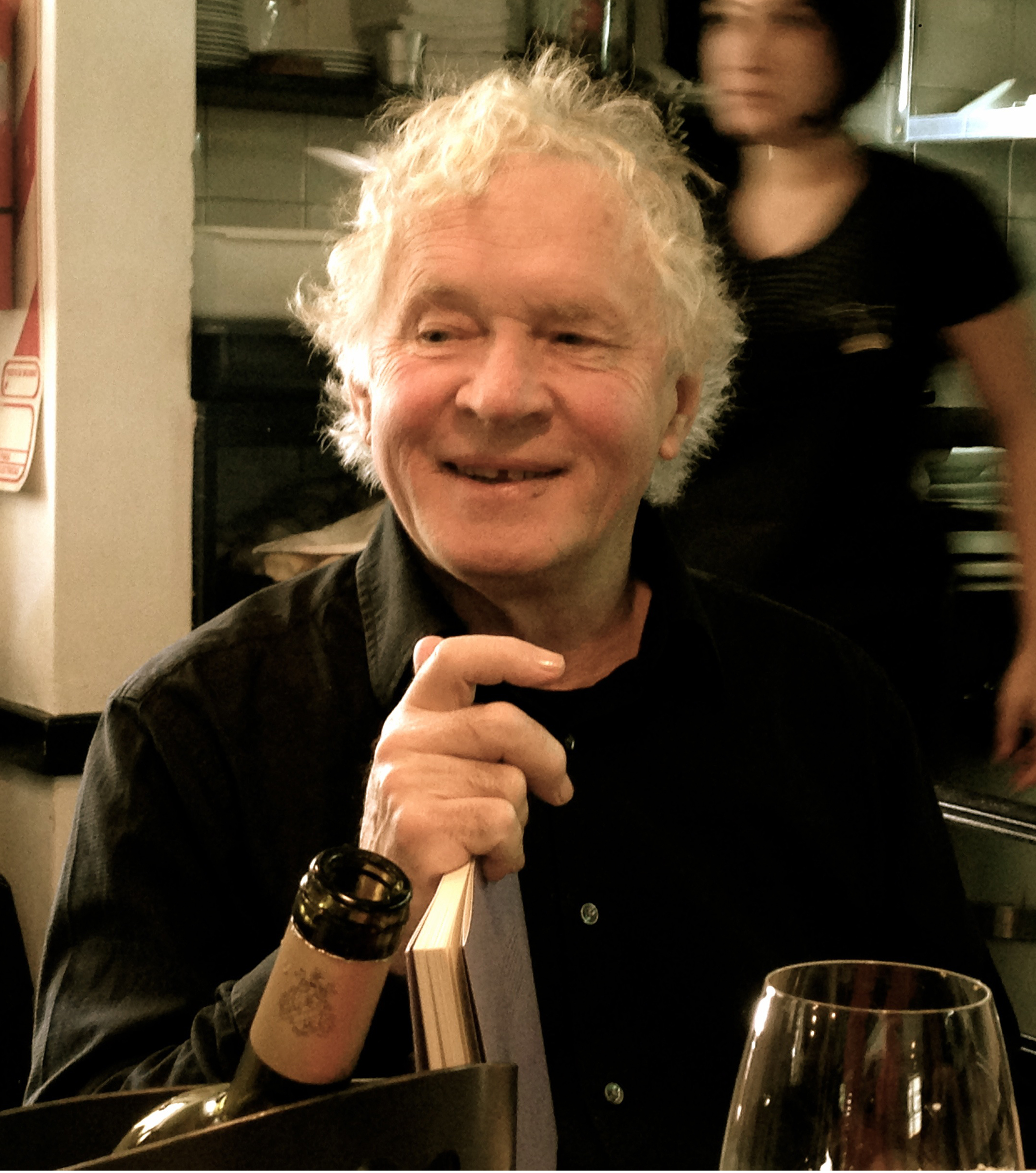 Kevin Power (Buenos Aires, 2013). Foto tomada por Tom Patchett.